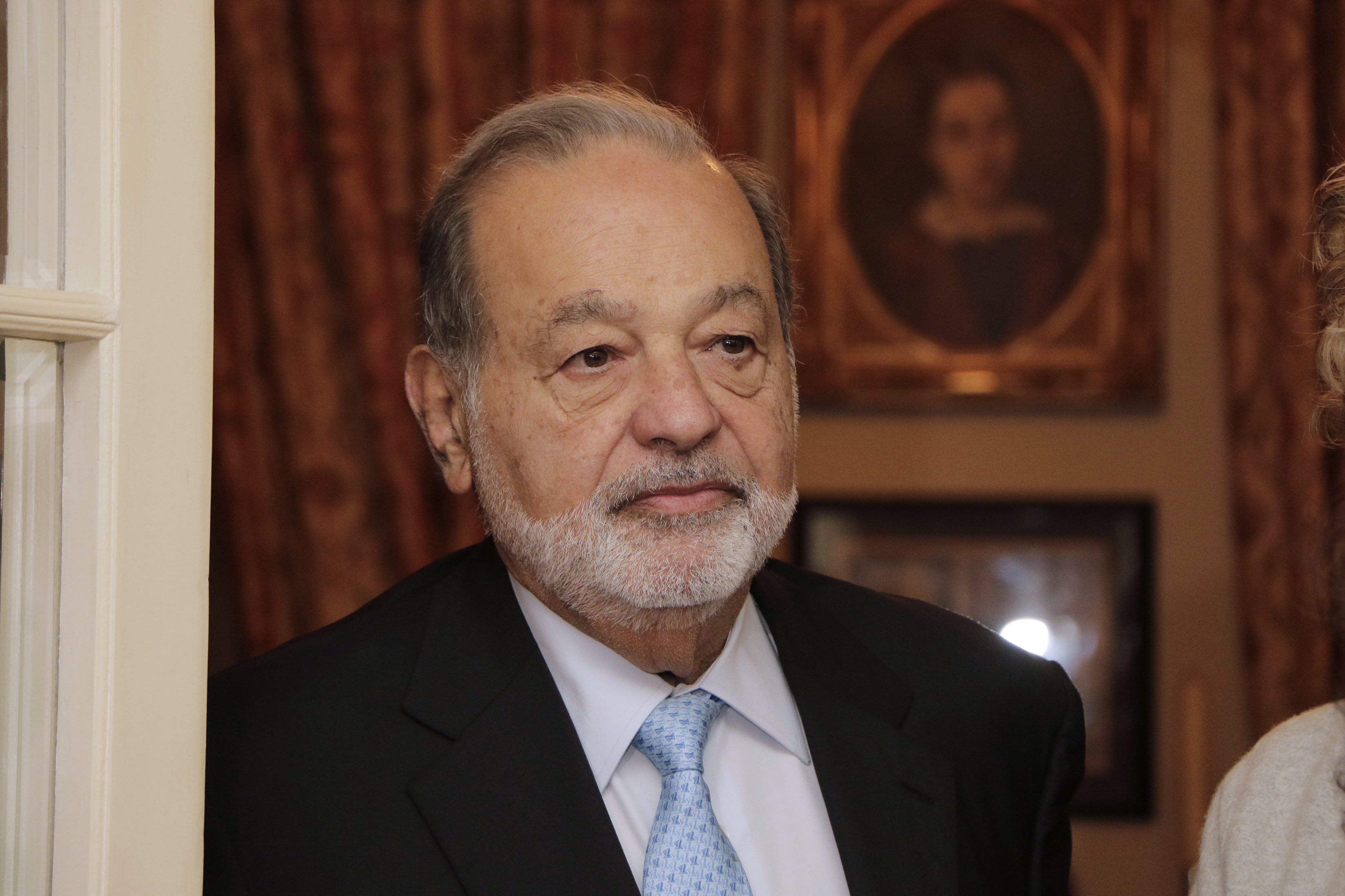 Jueves 20 de diciembre de 2018Apertura de El Museo Soumaya Casa "Guillermo Tovar de Teresa", con la asistencia del secretario de Cultura capitalina, Alfonso Suárez del Real, la directora del INBA, Lucina Jiménez, y el ing. Carlos Slim, así como familiares del historiador Guillermo Tovar de Teresa El recinto, ubicado en Valladolid núm. 52, colonia Roma Norte, se podrá visitar gratuitamente de lunes a domingo, de 10:30 a 18:30 horas.Fotografía: Tania Victoria / Secretaría de Cultura de la Ciudad de México